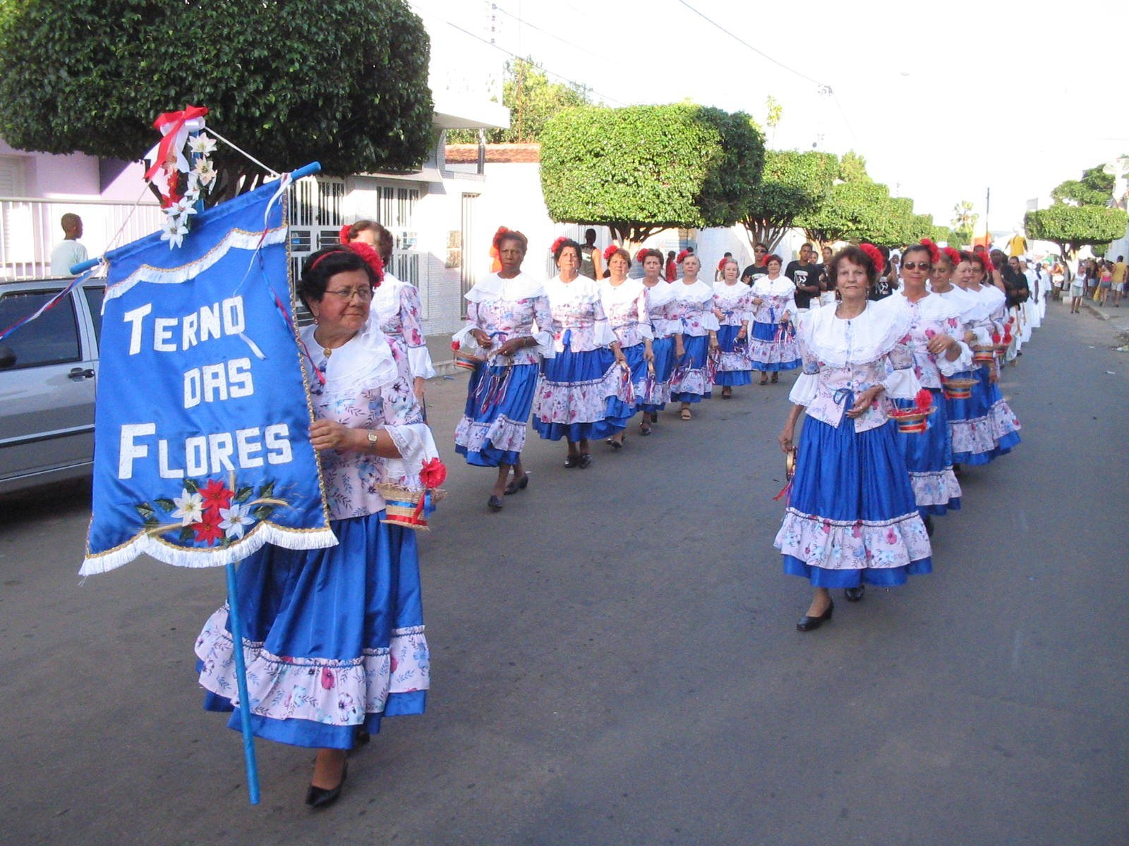 Terno de Reis em Caetité, em 2005.